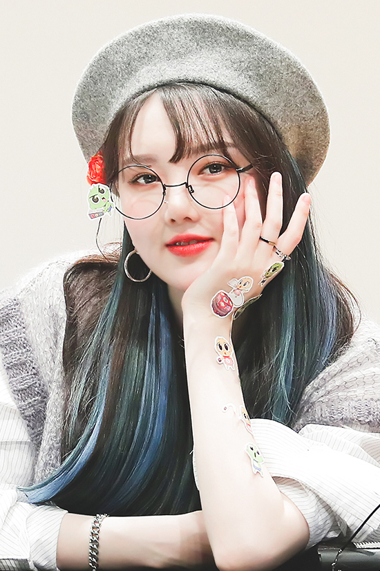 200216 상암 팬사인회 예린 (1)